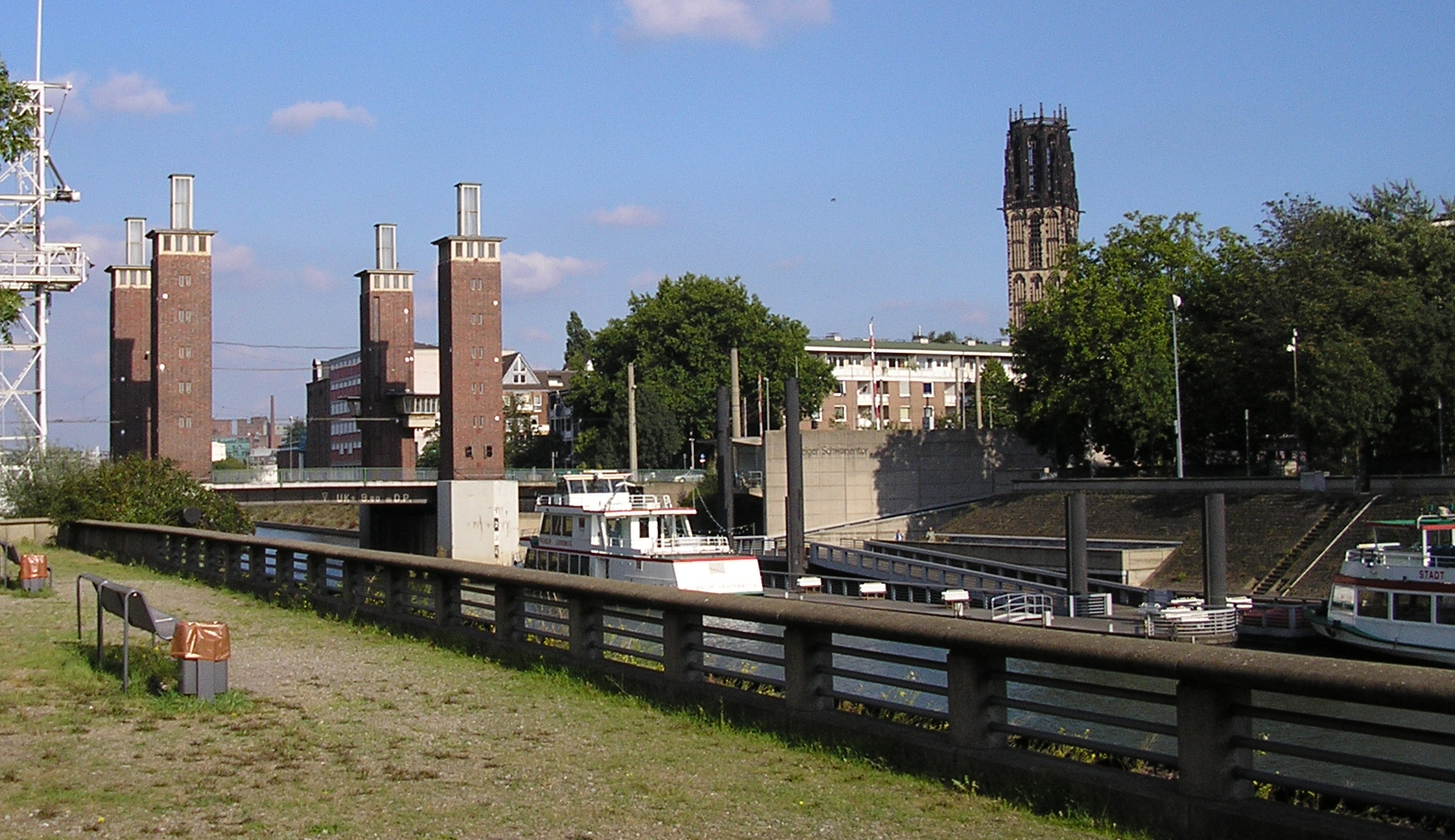 Schwantentor Bridge, Duisburg (Germany)